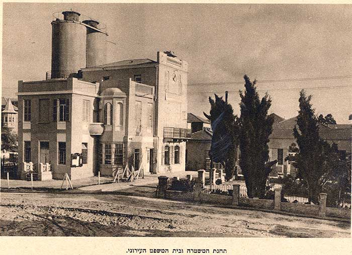 תחנת המשטרה העירונית של תל אביב ובית המשפט